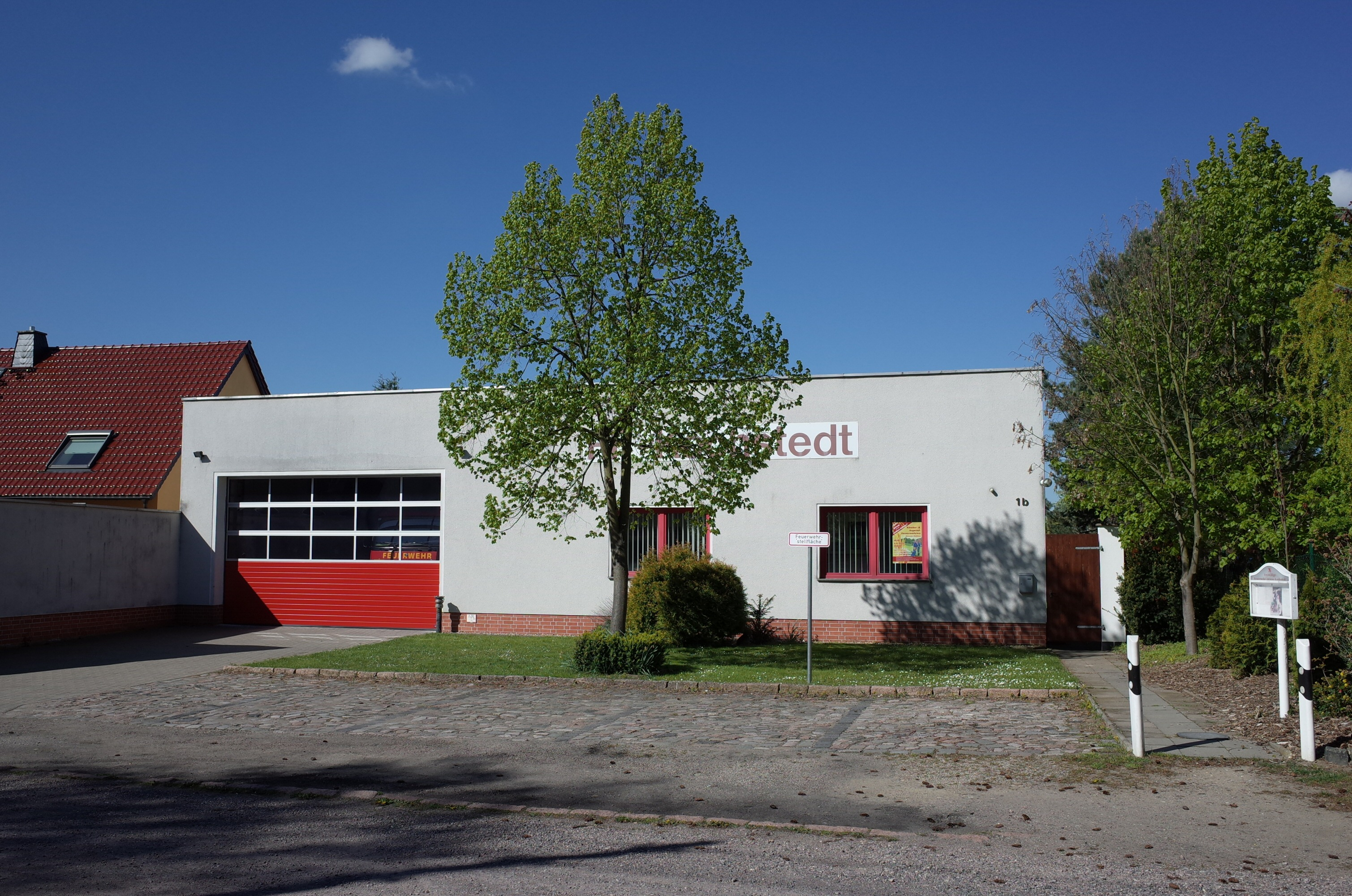 Dessau-Roßlau, die Freiwillige Feuerwehr im Ortsteil Kochstedt.